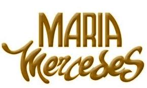 Logotipo da telenovela mexicana Maria Mercedes, da emissora Televisa do ano de 1992.